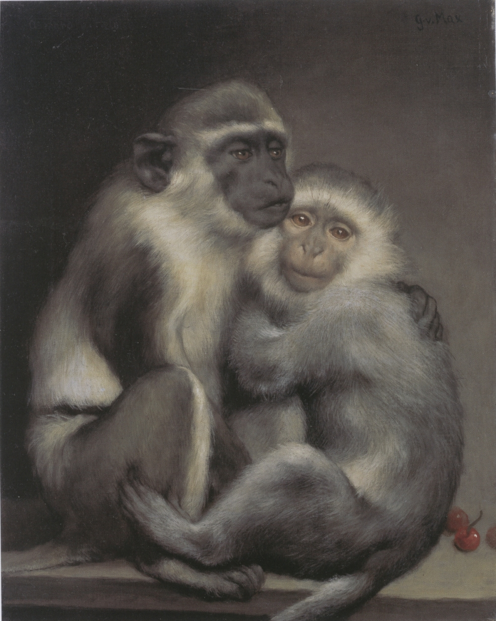 Gabriel von Max - Abelard und Heloise